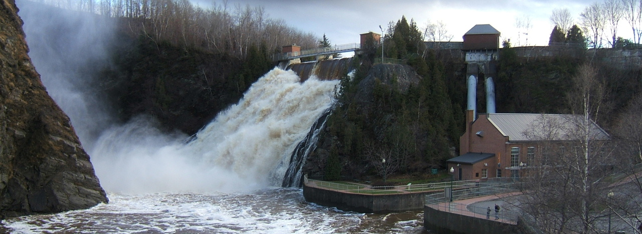 Chutes sur la rivière du Loup, au Centre-Ville de Rivière-du-Loup avec, à droite, une centrale hydraulique. Auteur : Nicolas Gagnon, automne 2006.